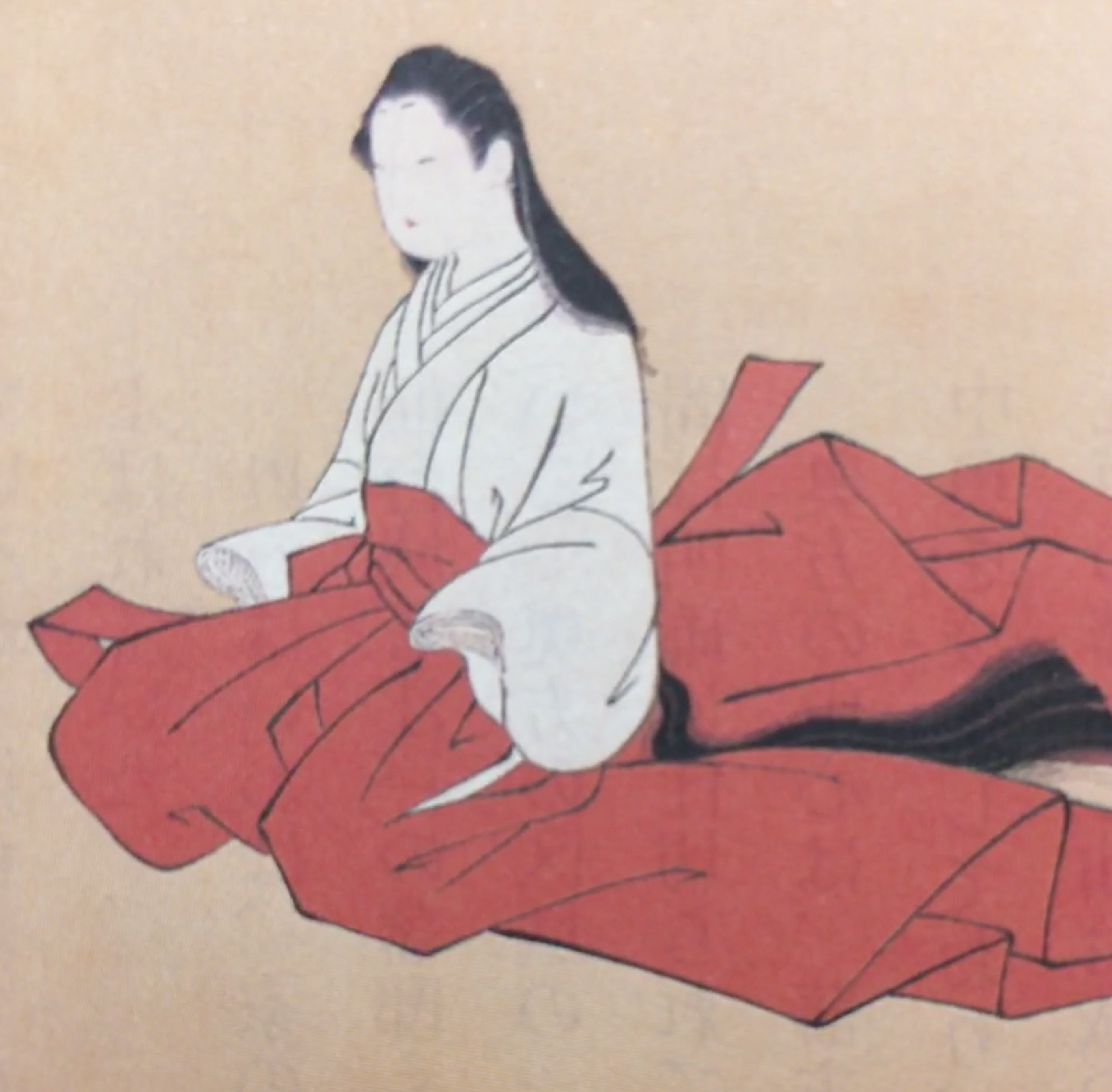 雲松院(利根姫。徳川宗直の女、征夷大将軍徳川吉宗養女、伊達宗村の正室)の肖像。